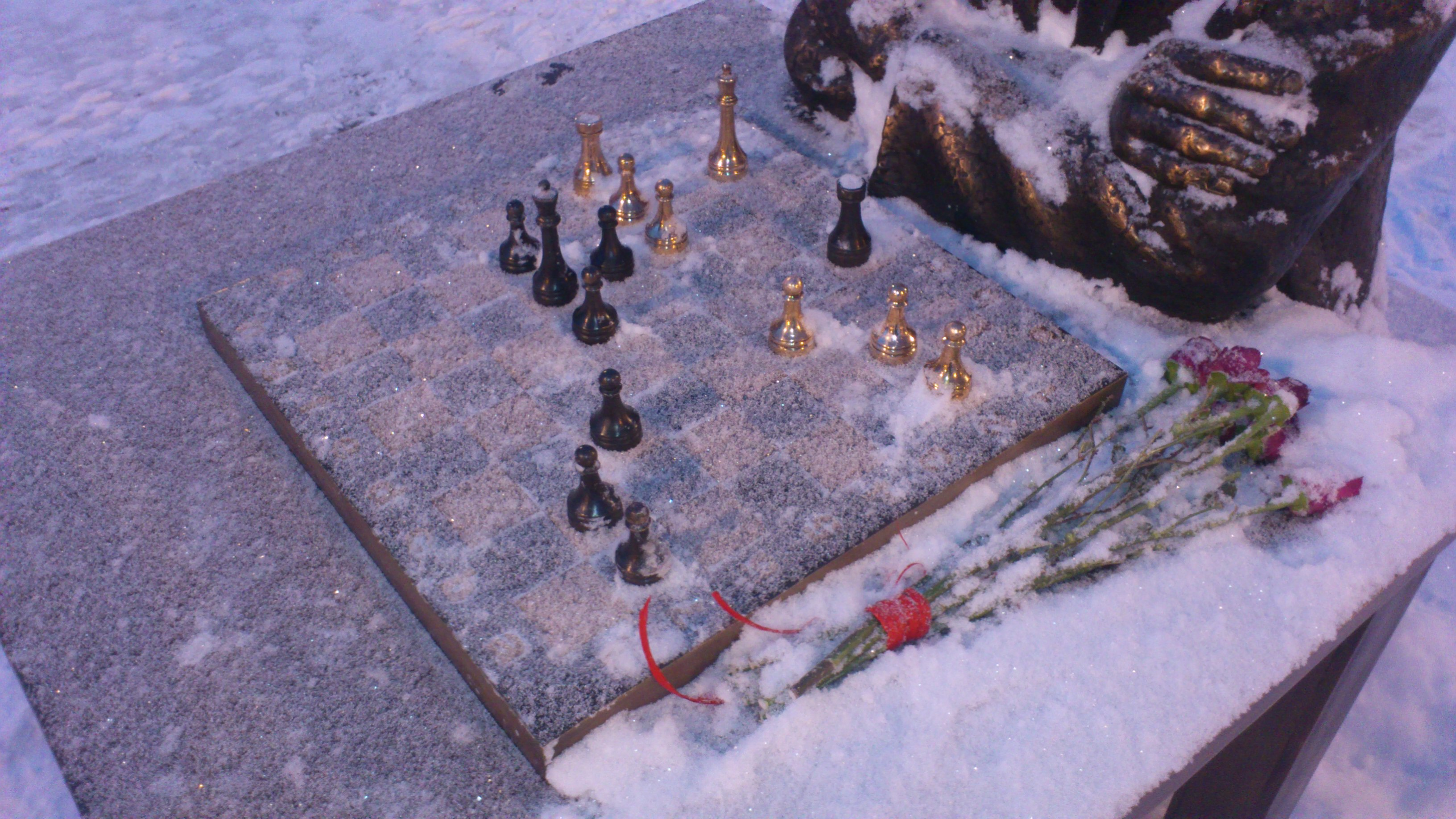 Paul Kerese mälestussammas Narvas (2016, malelaud)